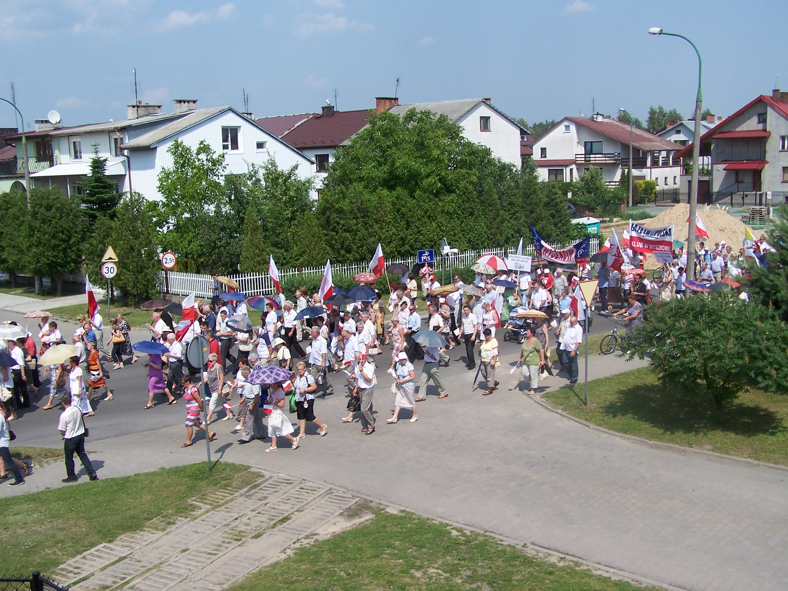 Demonstracja w obronie Telewizji Trwam w Wyszkowie.